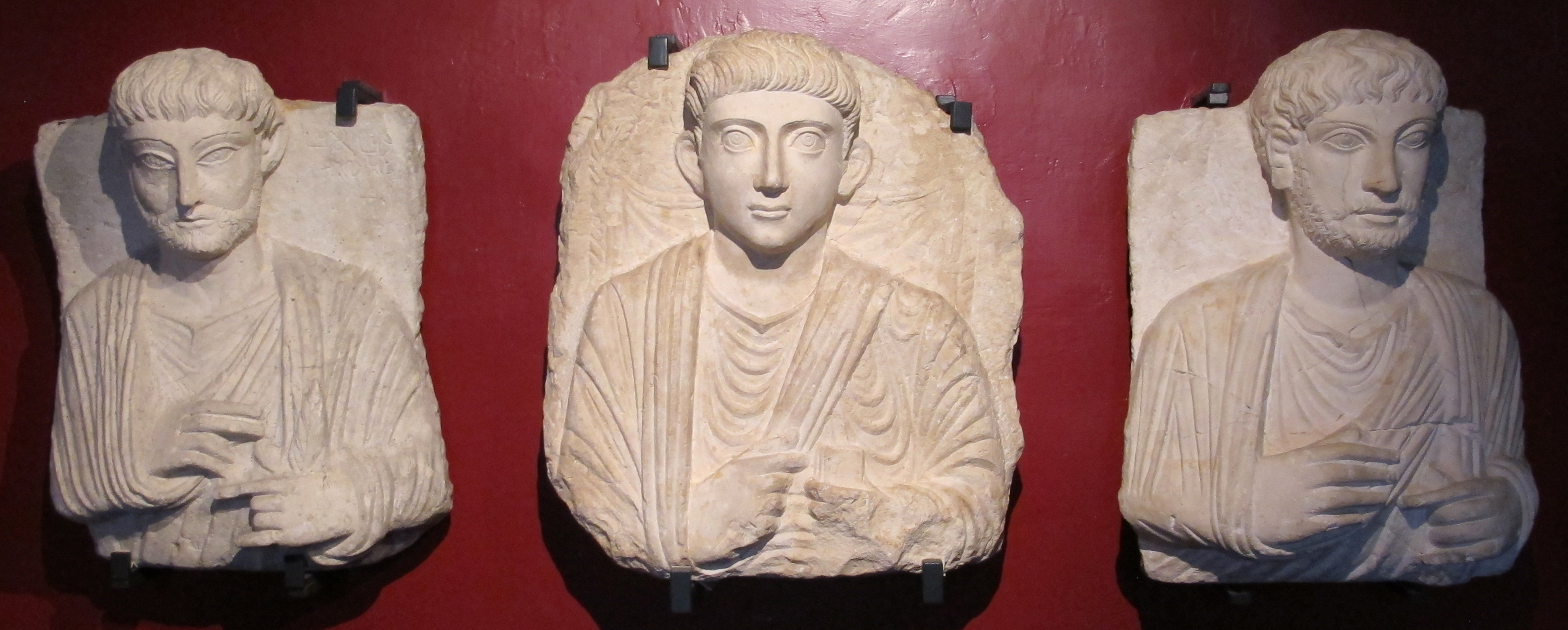 Museo Gregoriano Egizio